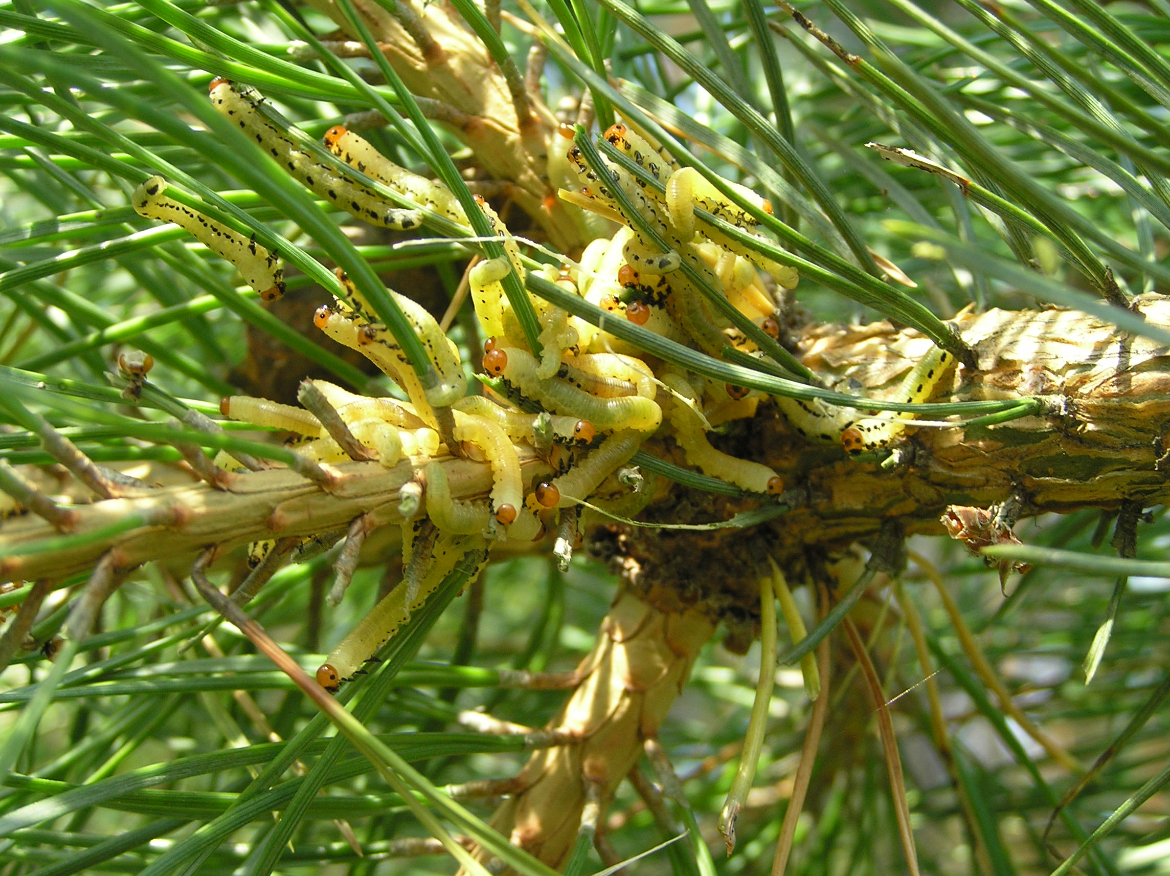 Diprion pini, Borecznik sosnowy, Polska